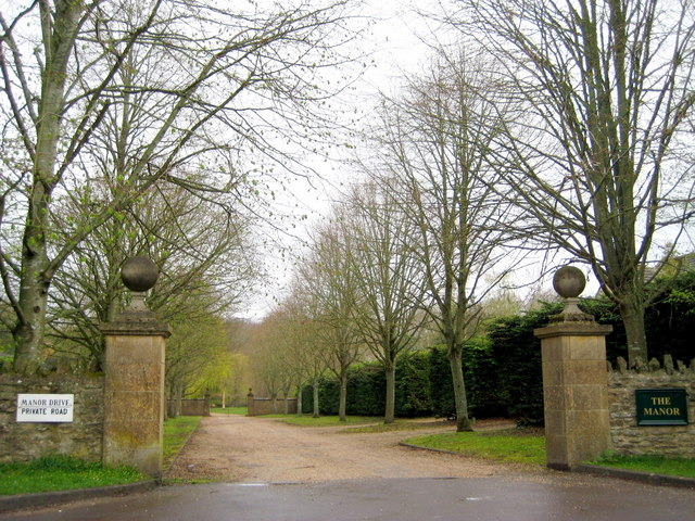 Manor drive - West Coker